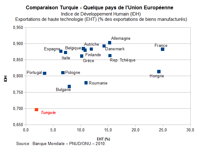 Comparaison de l'IDH et de EHT de la Turquie et de quelques pays européens - Banque Mondiale, PNUD-ONU, 2010.